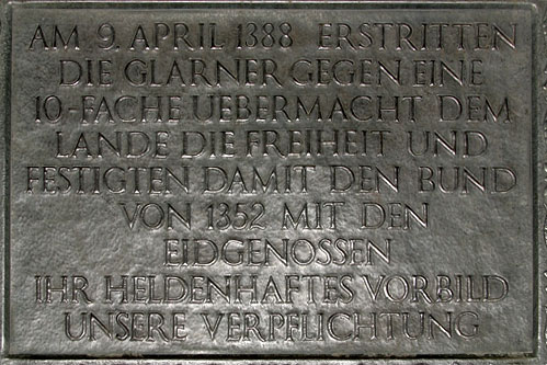 Schlachtdenkmal in Näfels: Gedenktafel